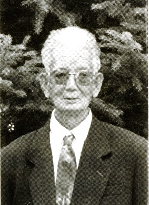 甘肅省藏民選區立法委員楊生華